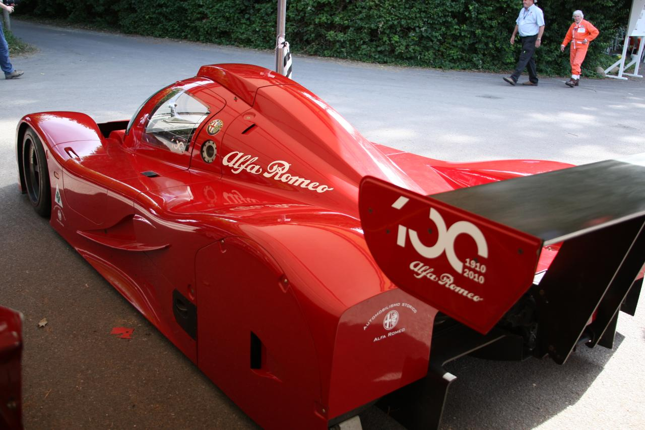 Alfa Romeo SE 048 SP